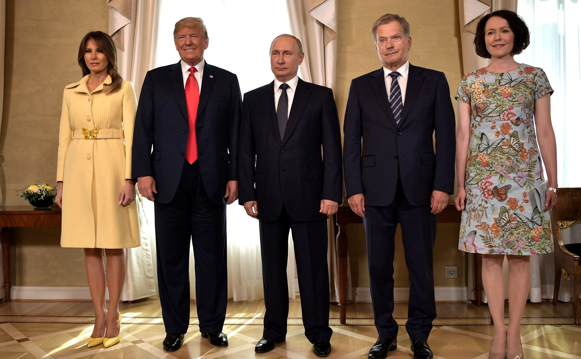 Совместное фотографирование. Слева направо: супруга Президента Соединённых Штатов Америки Мелания Трамп, Президент Соединённых Штатов Америки Дональд Трамп, Президент России Владимир Путин, Президент Финляндии Саули Ниинистё, супруга Президента Финляндии Йенни Элина Хаукио.